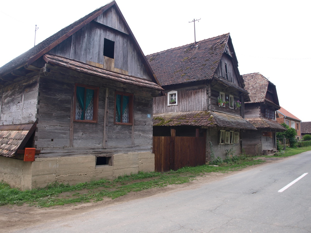 Stare kuće u selu Krapje, Sisačko-moslavačka županija.